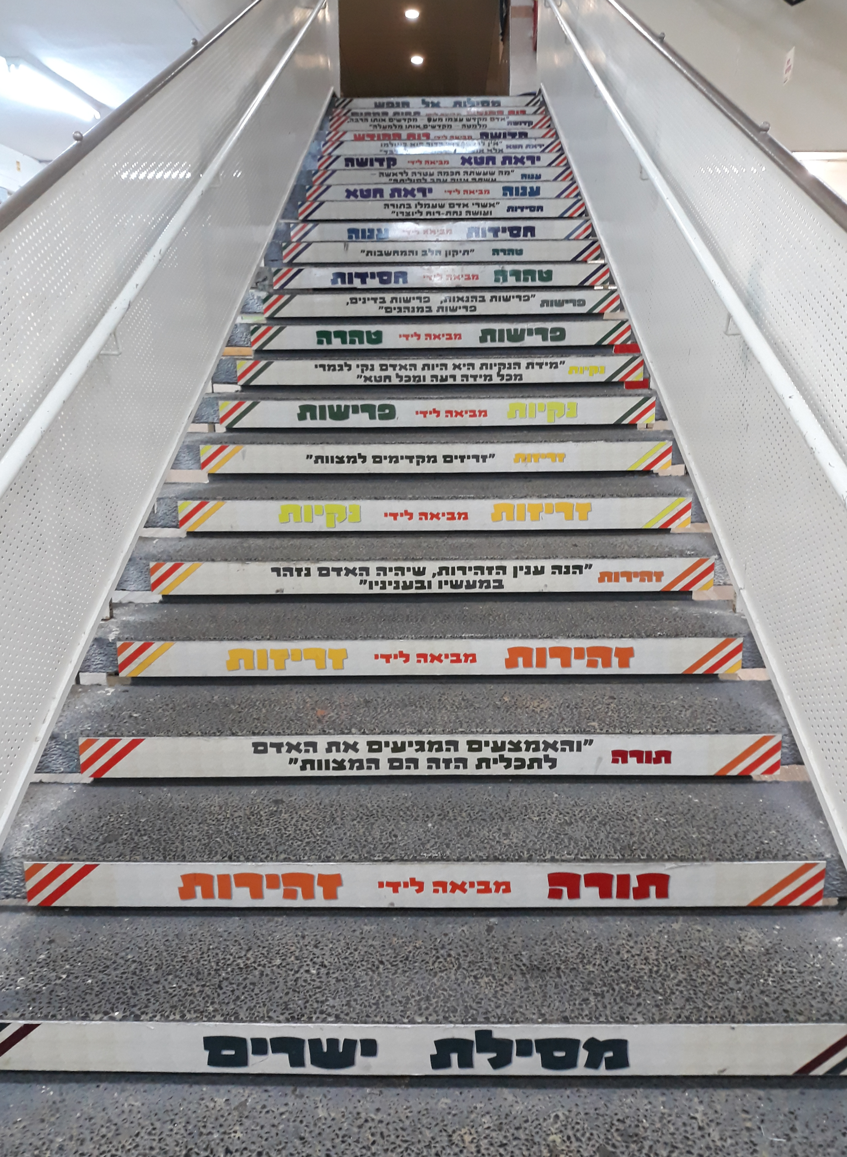 שלבי מסילת ישרים כתובים על מדרגות בישיבת בני עקיבא פרחי אהרן בקרית שמואל